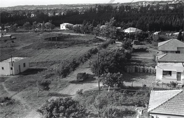 ביתן אהרן - מראה